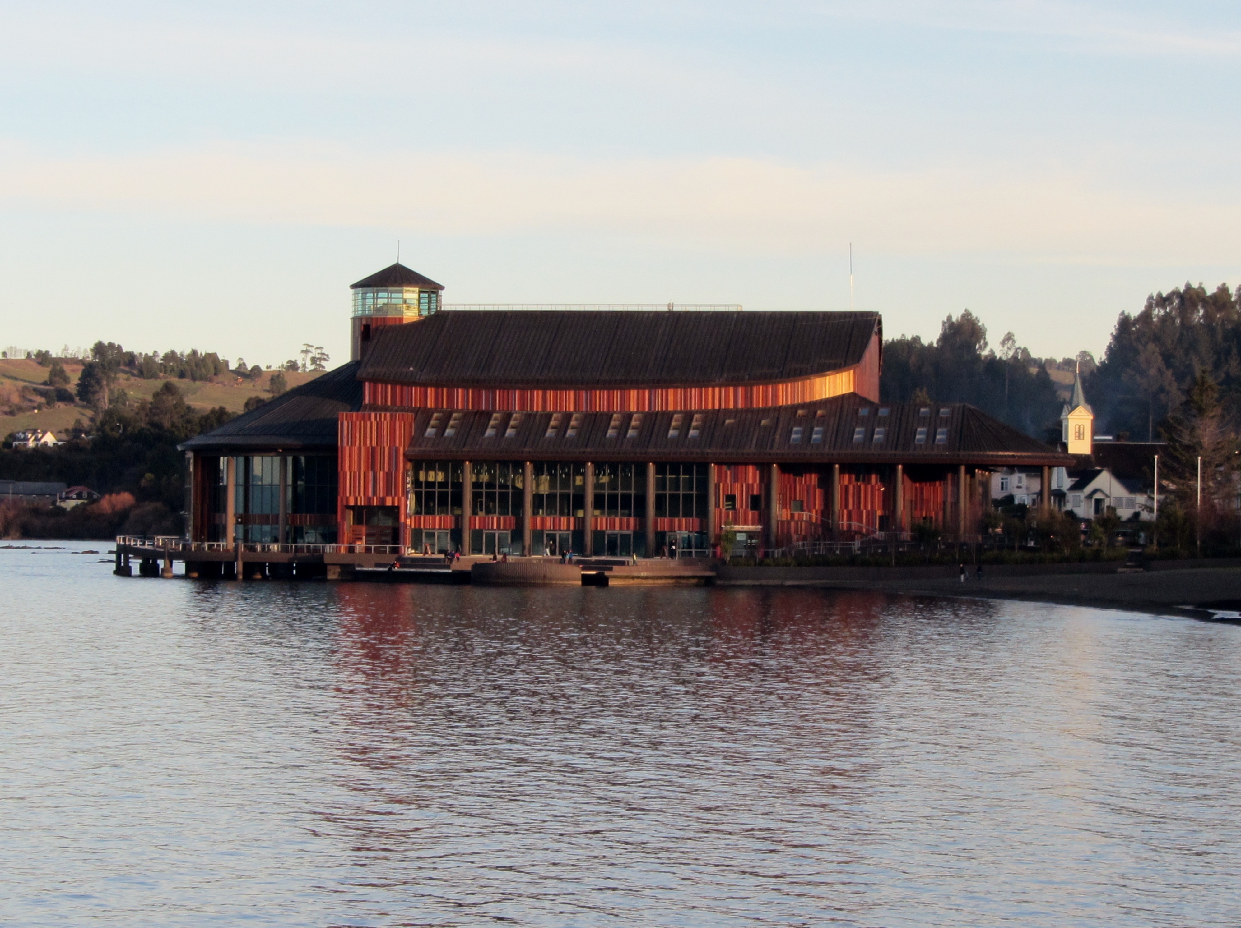 El Teatro del Lago en la ciudad de Frutillar, Chile. A la derecha, la iglesia luterana.